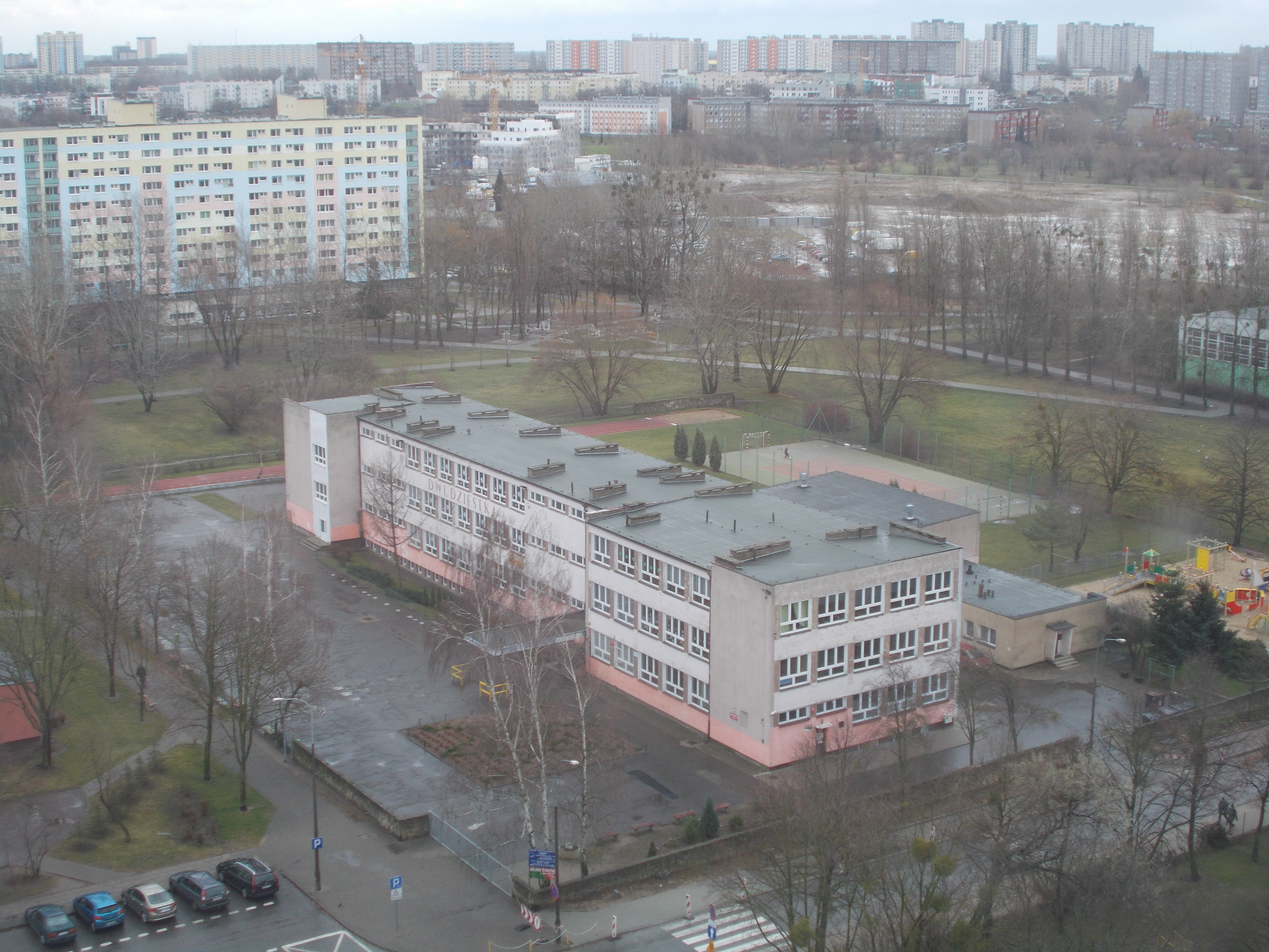 Osiedle Rzeczypospolitej w Poznaniu.Widok na Szkołę Podstawową nr 20.